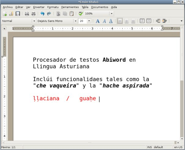 Semeya-captura d'Abiword, un procesador llibre de testos con llicencia GPL